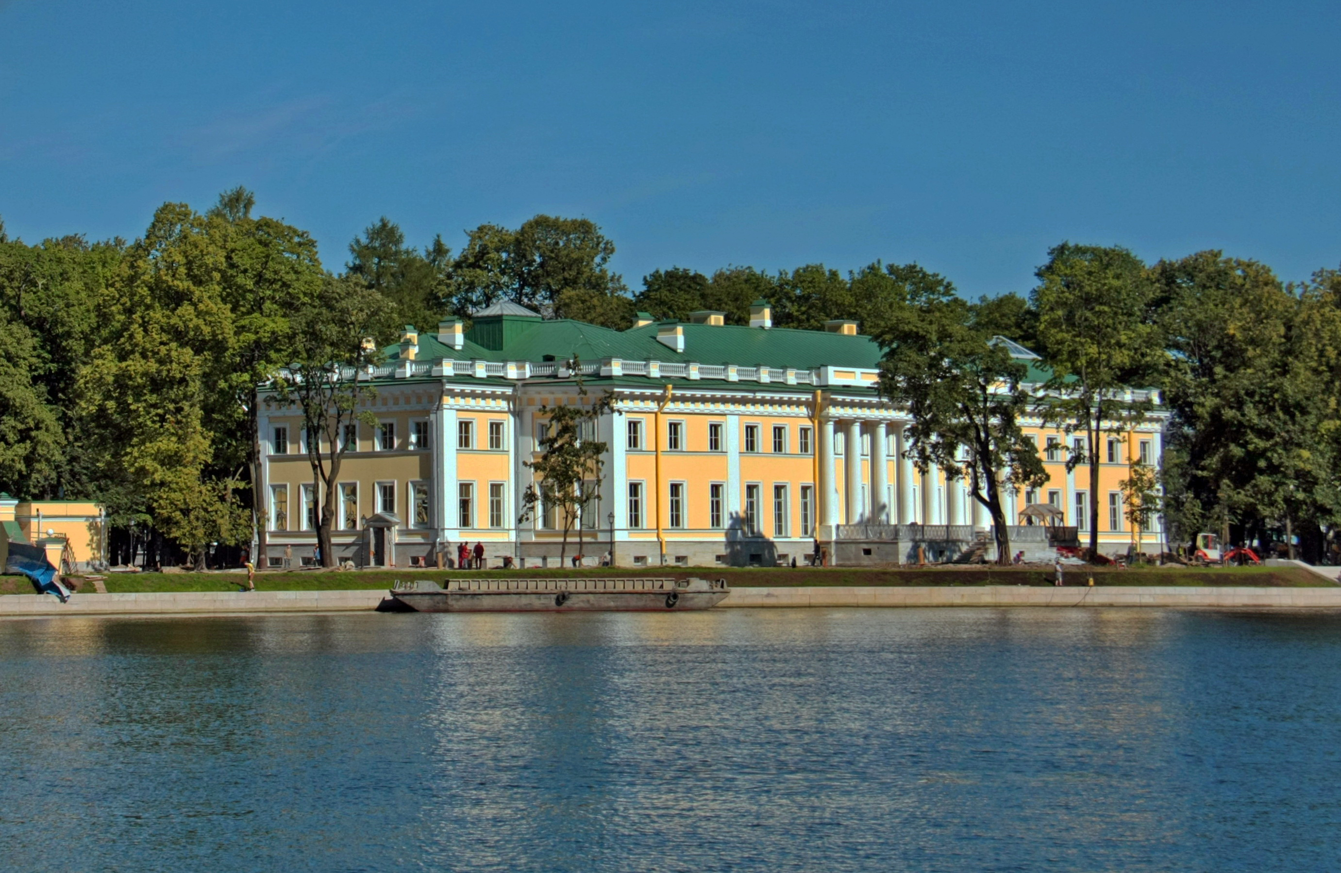 a cropped version of File:Стрелка Каменного острова, дворец.jpg